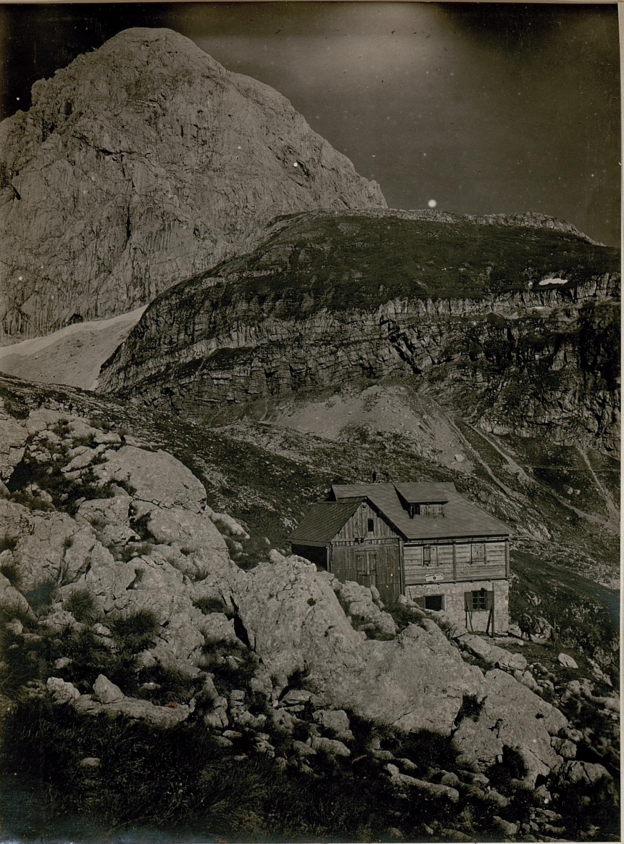 Manhart-Hütte mit den 2678m hohen Manhart im Hintergrund. (11/8.1917.)